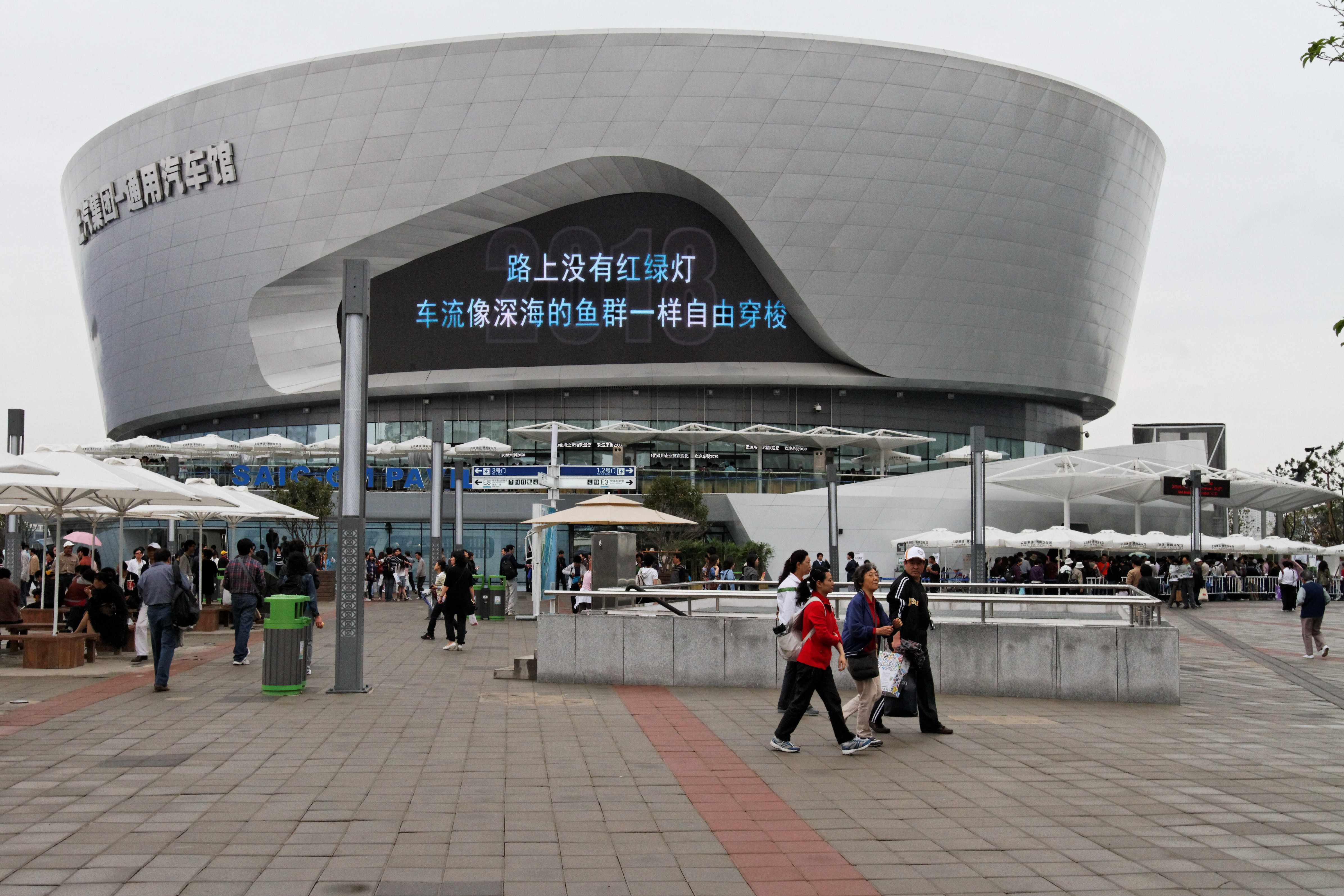 SAIC-GM Pavilion, Expo 2010